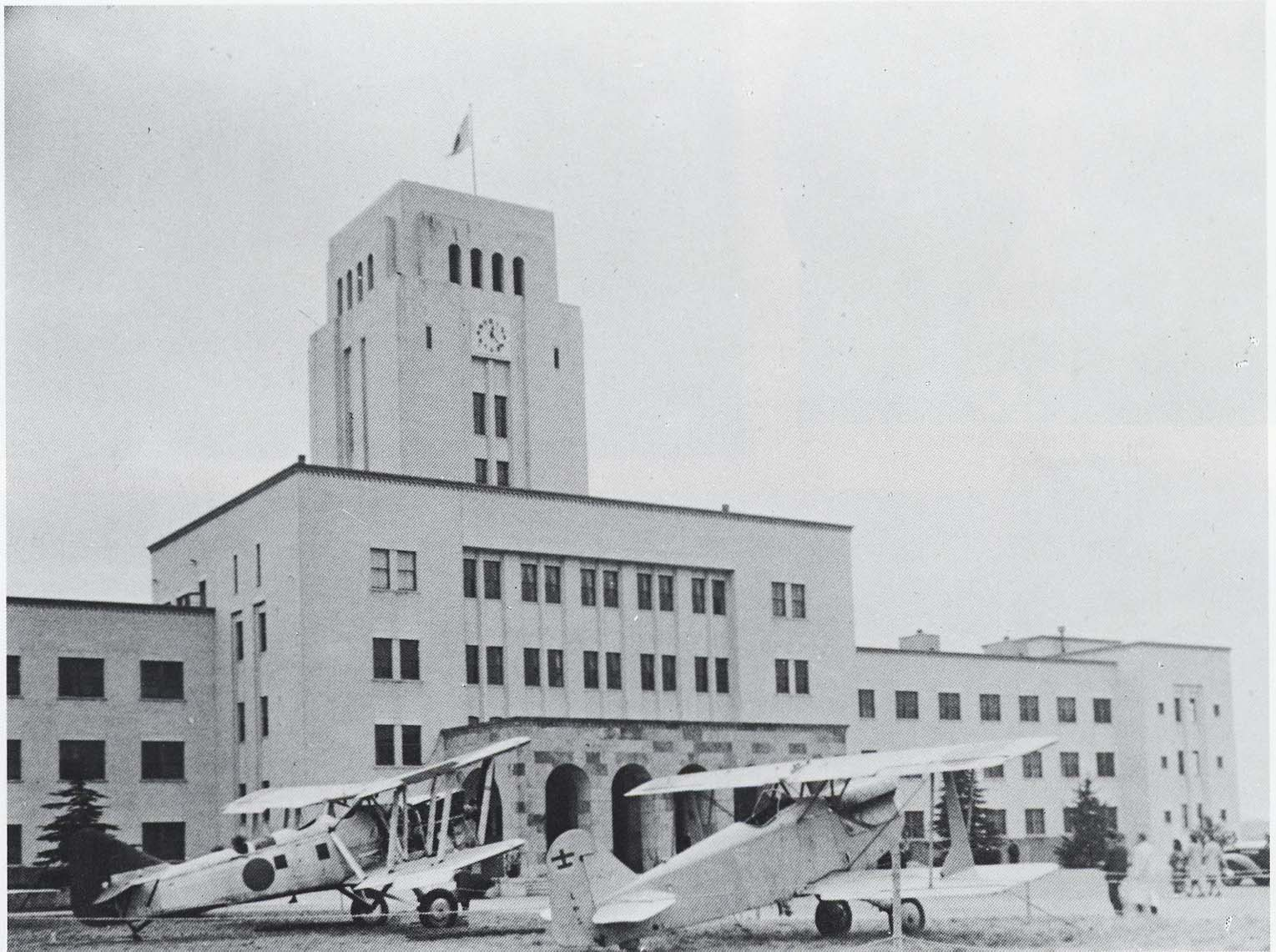 昭和15年当時の本館前。本館前の飛行機は創立60周年記念行事のために展示されたもの。奥が89式艦上攻撃機、手前が92式戦闘機。